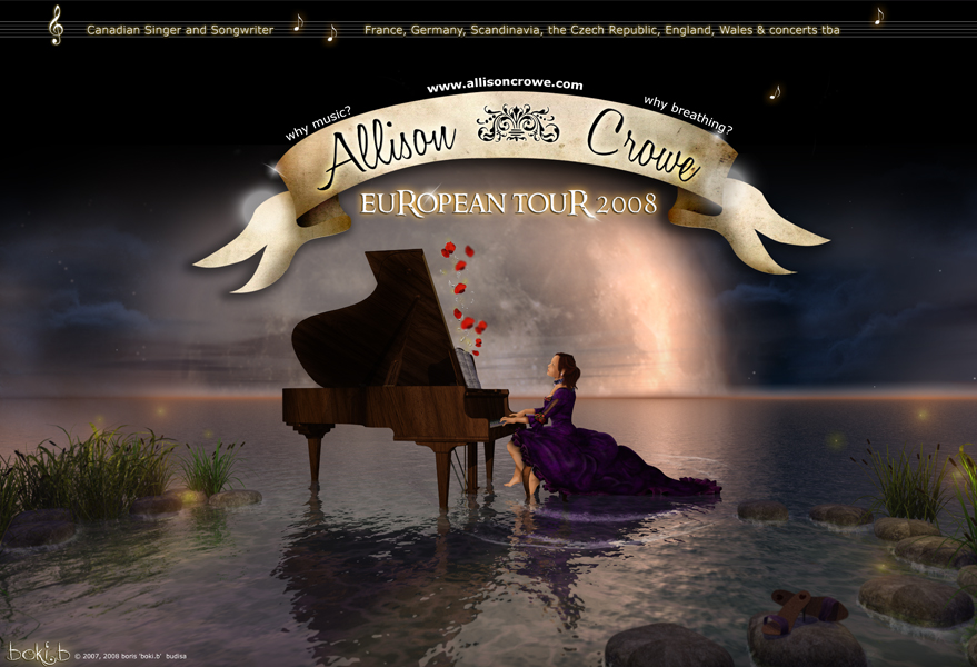 Offizielles Tourplakat